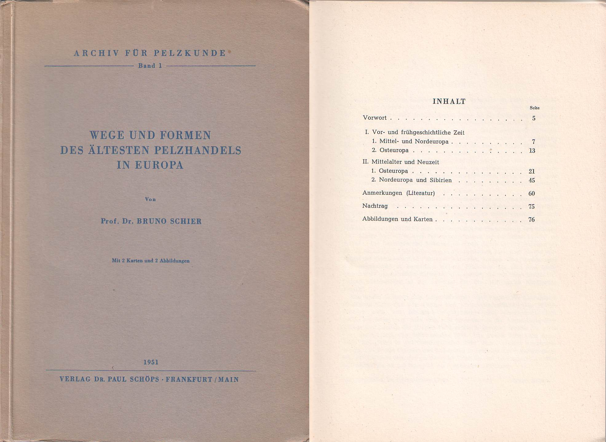 Dr. Bruno Schier: Wege und Formen des ältesten Pelzhandels in Europa.. Buchdeckel und Inhaltsverzeichnis. Verlag Dr. Paul Schöps, Frankfurt/Main 1951. Archiv für Pelzkunde Band 1. Paperback, 17 x 24,5 cm, 78 Seiten.